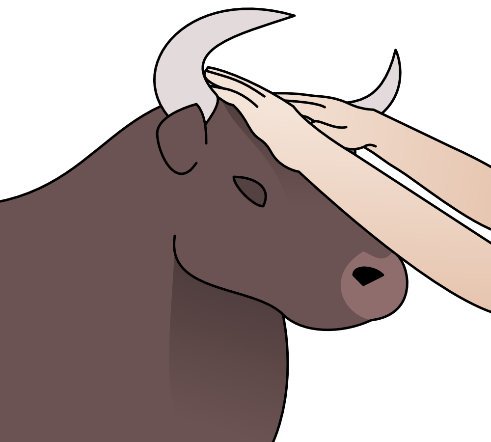 איור לתנועת הסמיכה [1]